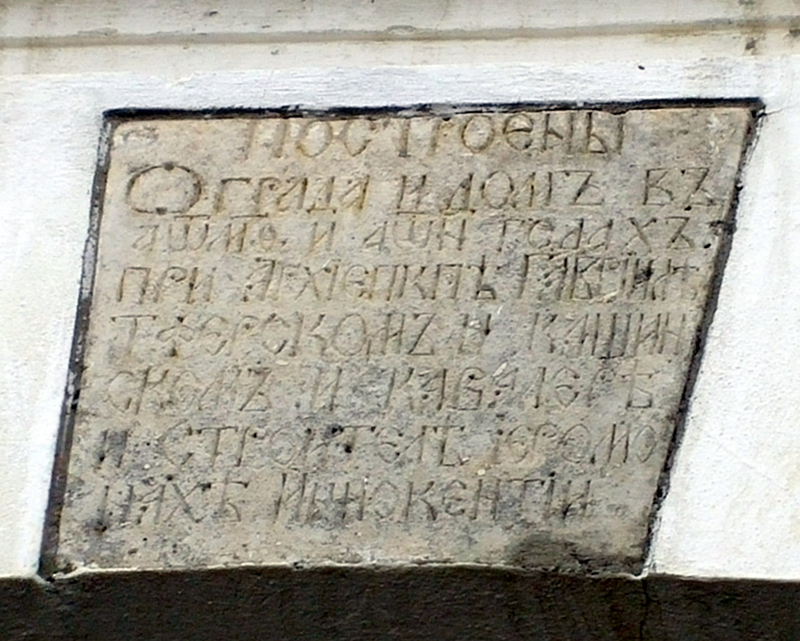 Табличка над главным входом в Оршин монастырь c указанием периода постройки ограды и дома.